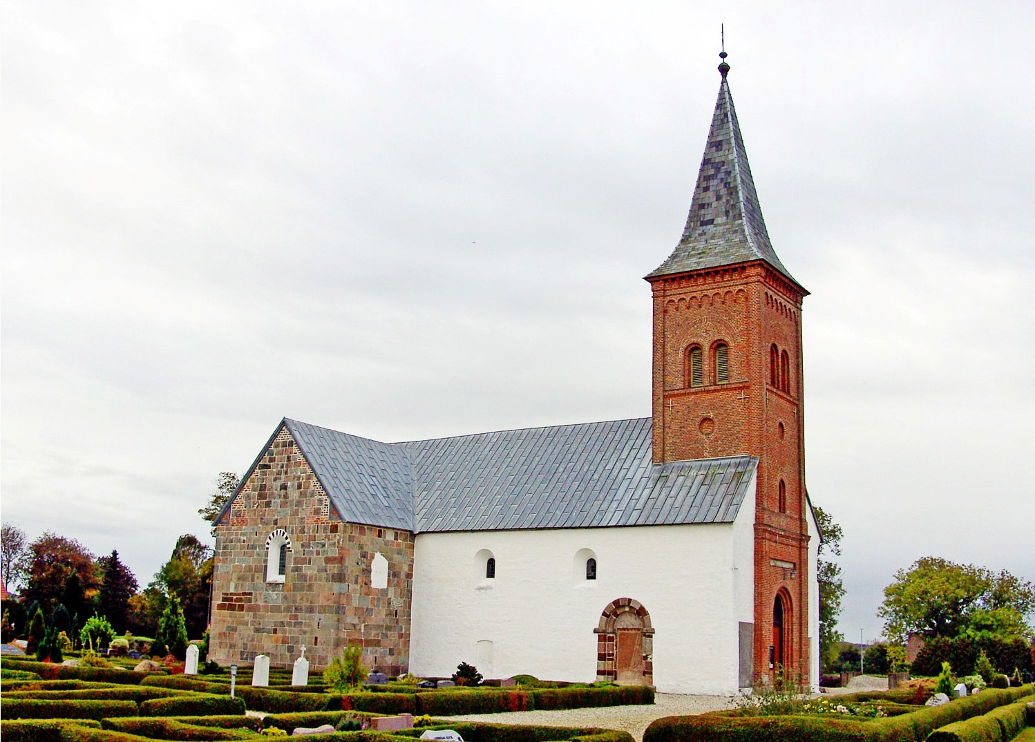 fra nordvest